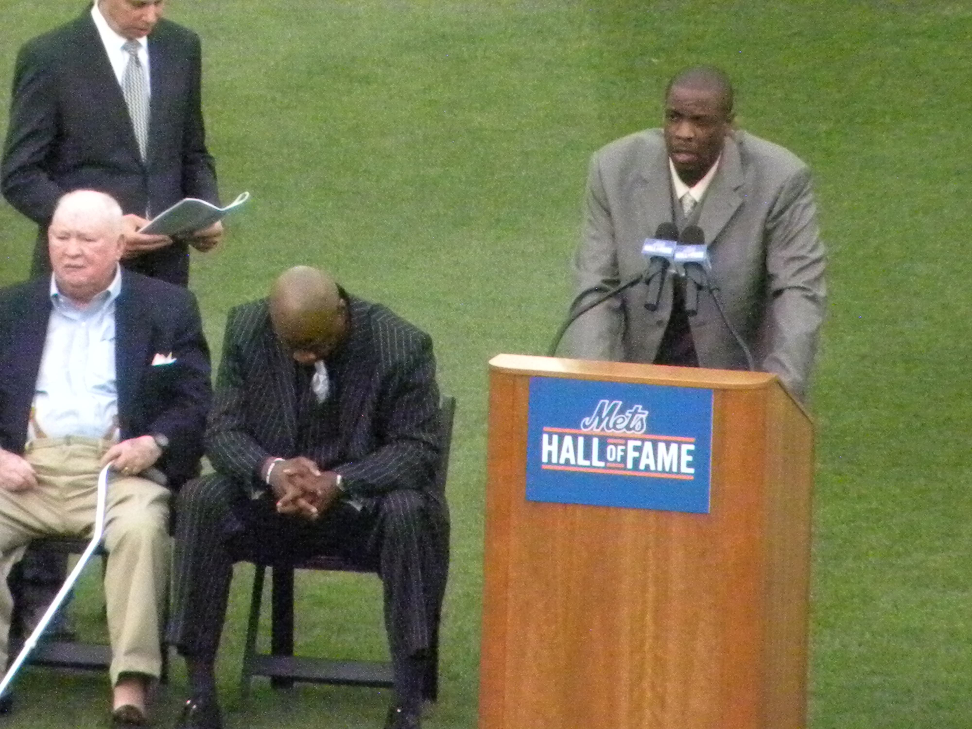 Diwght Gooden at Citi Field in 2010.